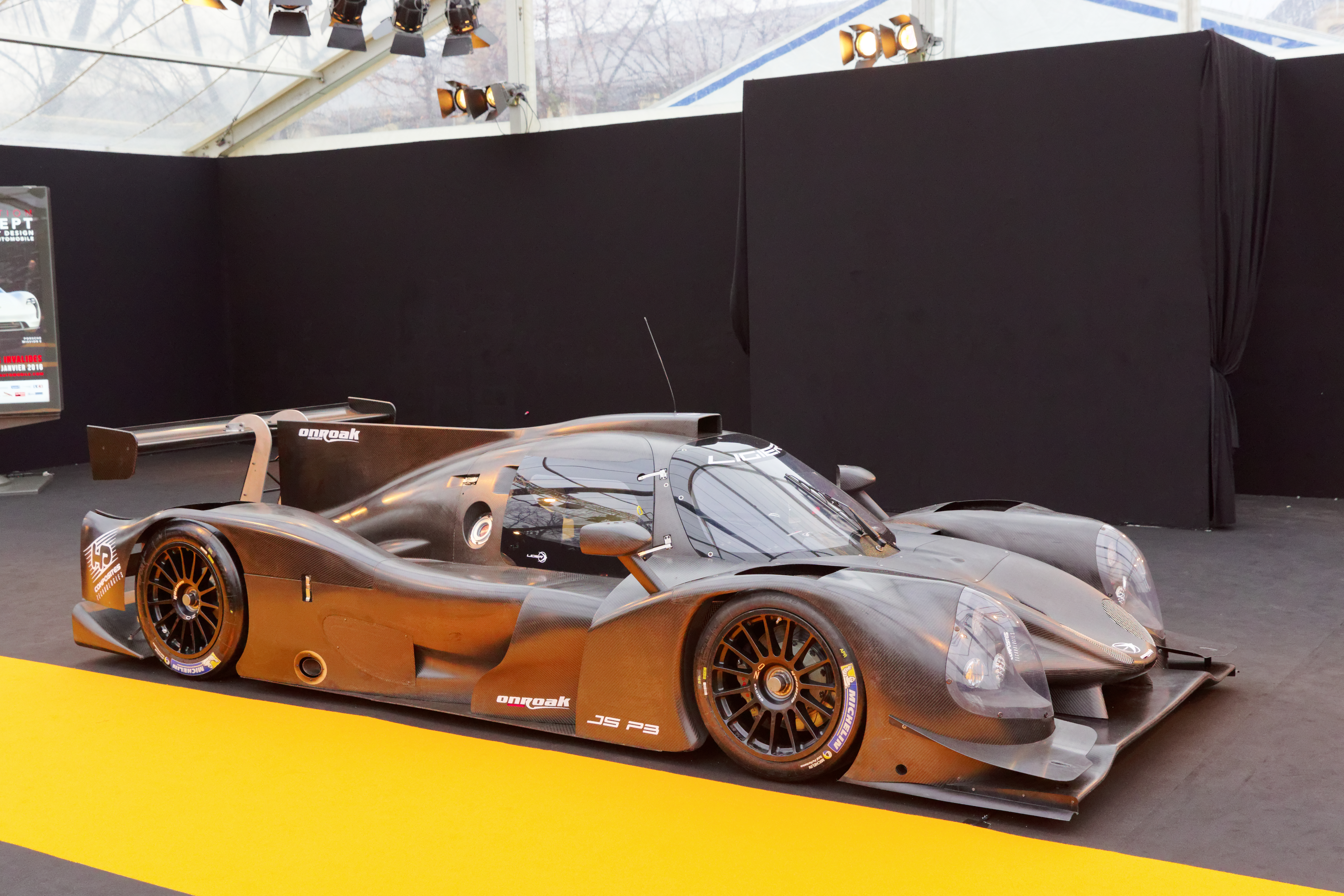 La Ligier JS P3 exposée lors du festival automobile international 2016.